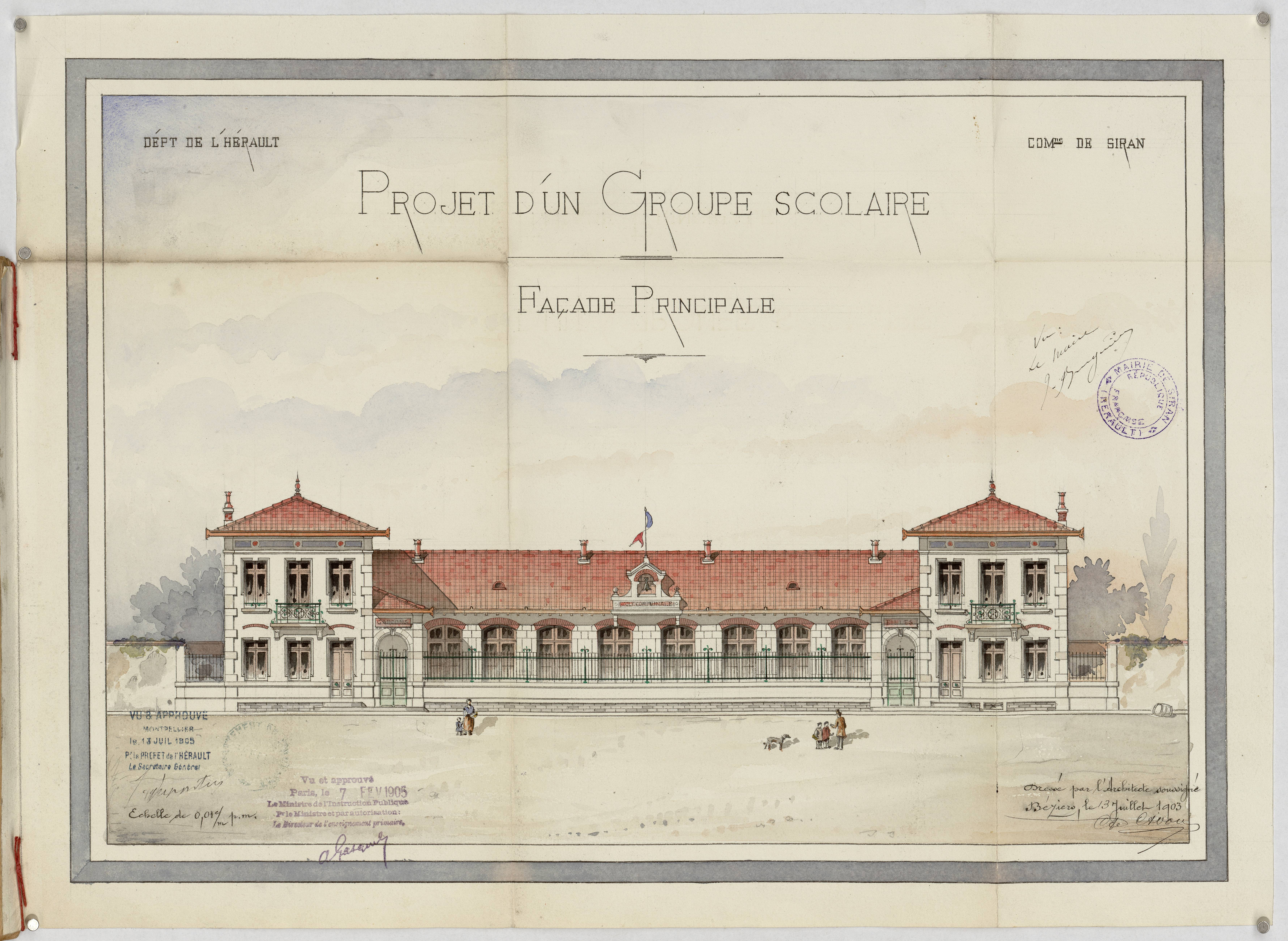 Siran. - Projet d'un groupe scolaire : façade principale, 1903